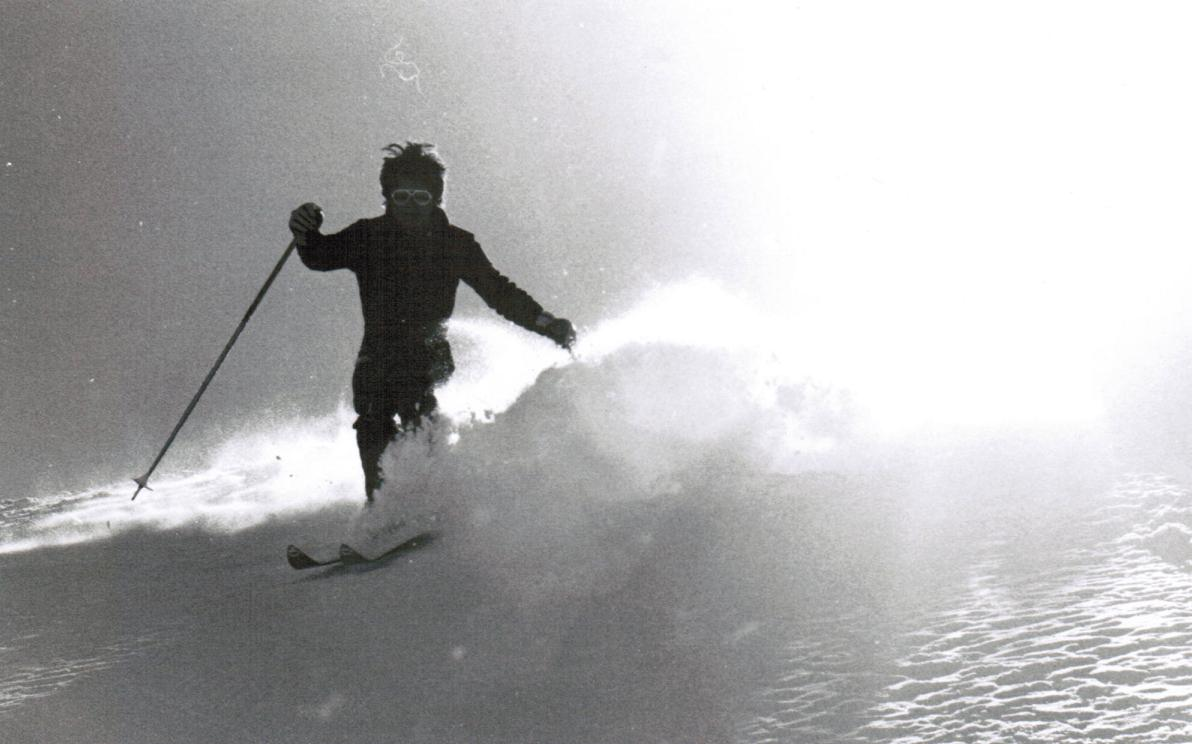 Eric LABOUREIX ski acrobatique bosse